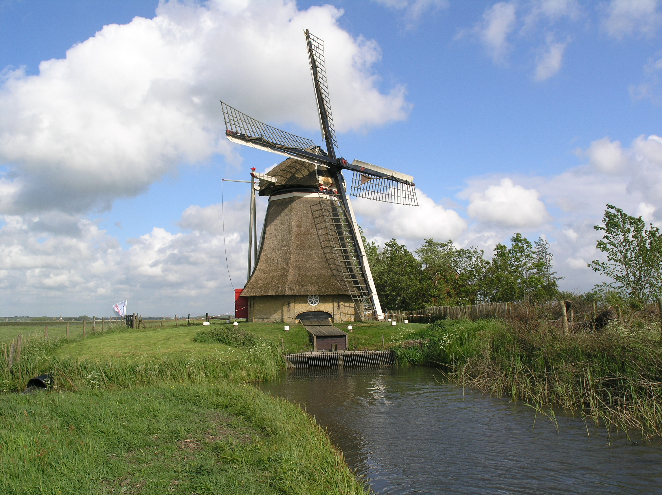 Wyns Poldermolen Wijnsermolen